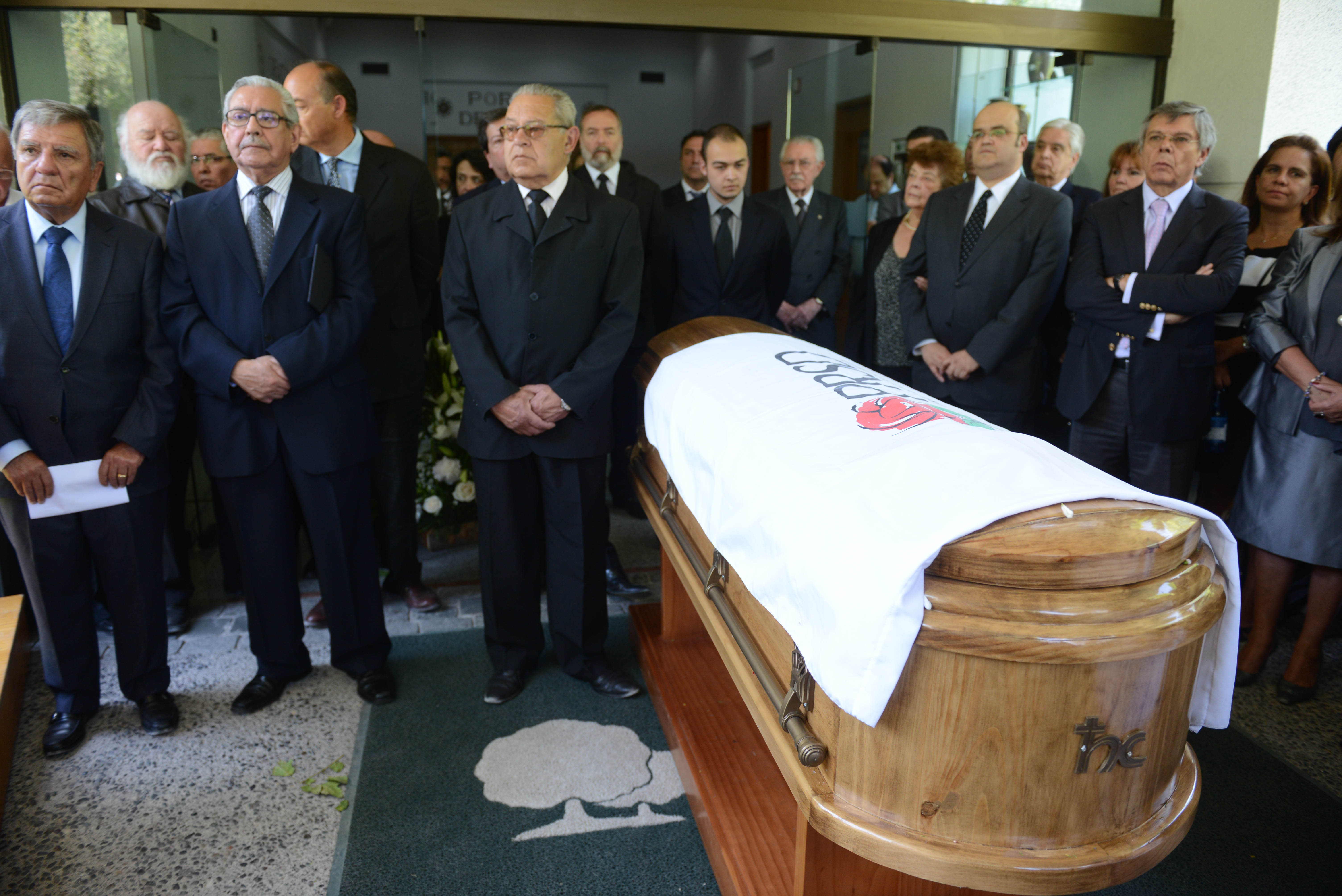 Funeral Orlando Cantuarias Cepeda10